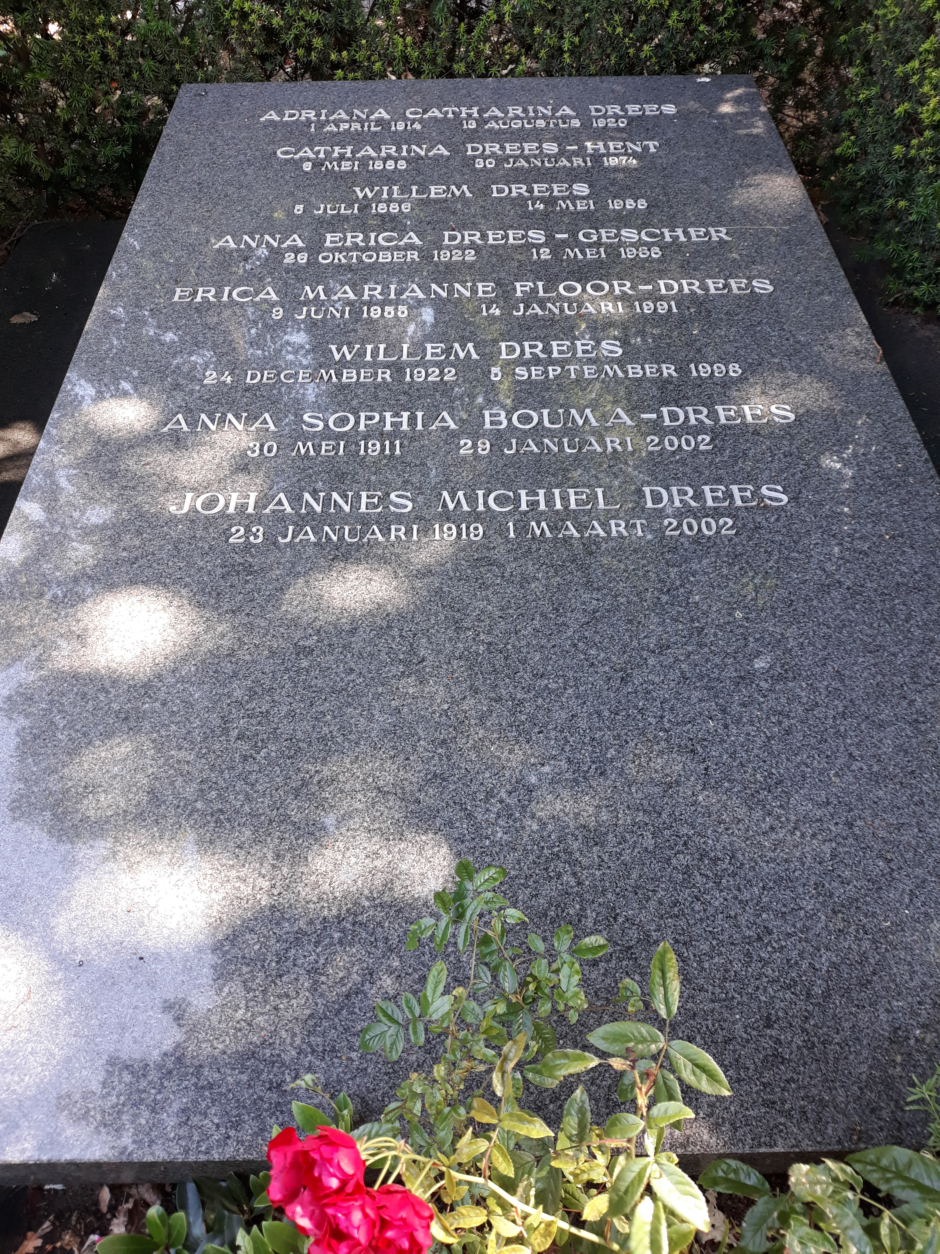 Das Grab des niederländischen Politikers Willem Drees junior und seiner Ehefrau Anna Erica Gescher im Familiengrab Drees auf dem Friedhof Oud Eik en Duinen in Den Haag